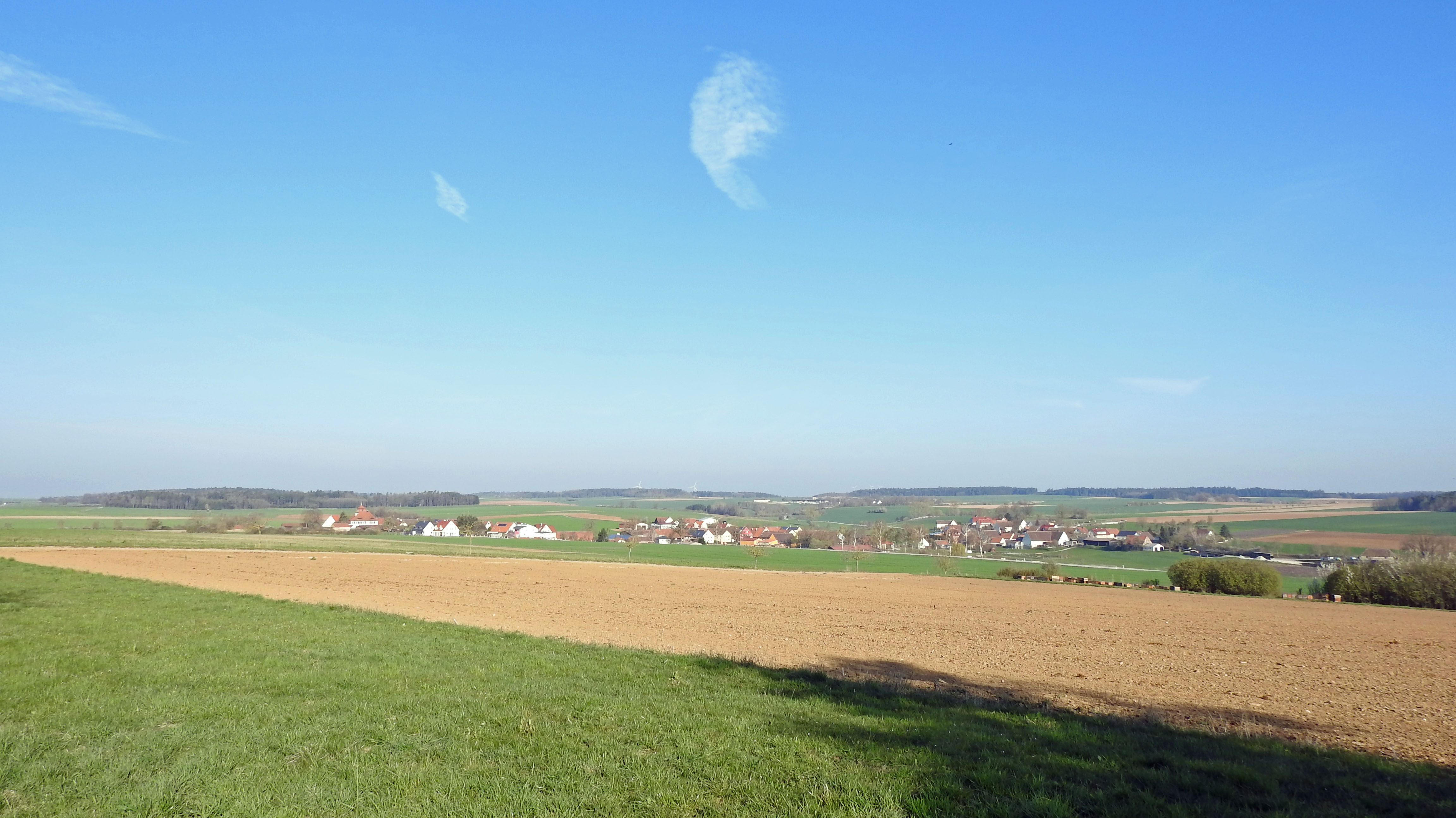 Obermichelbach, Wittelshofen, von Südosten